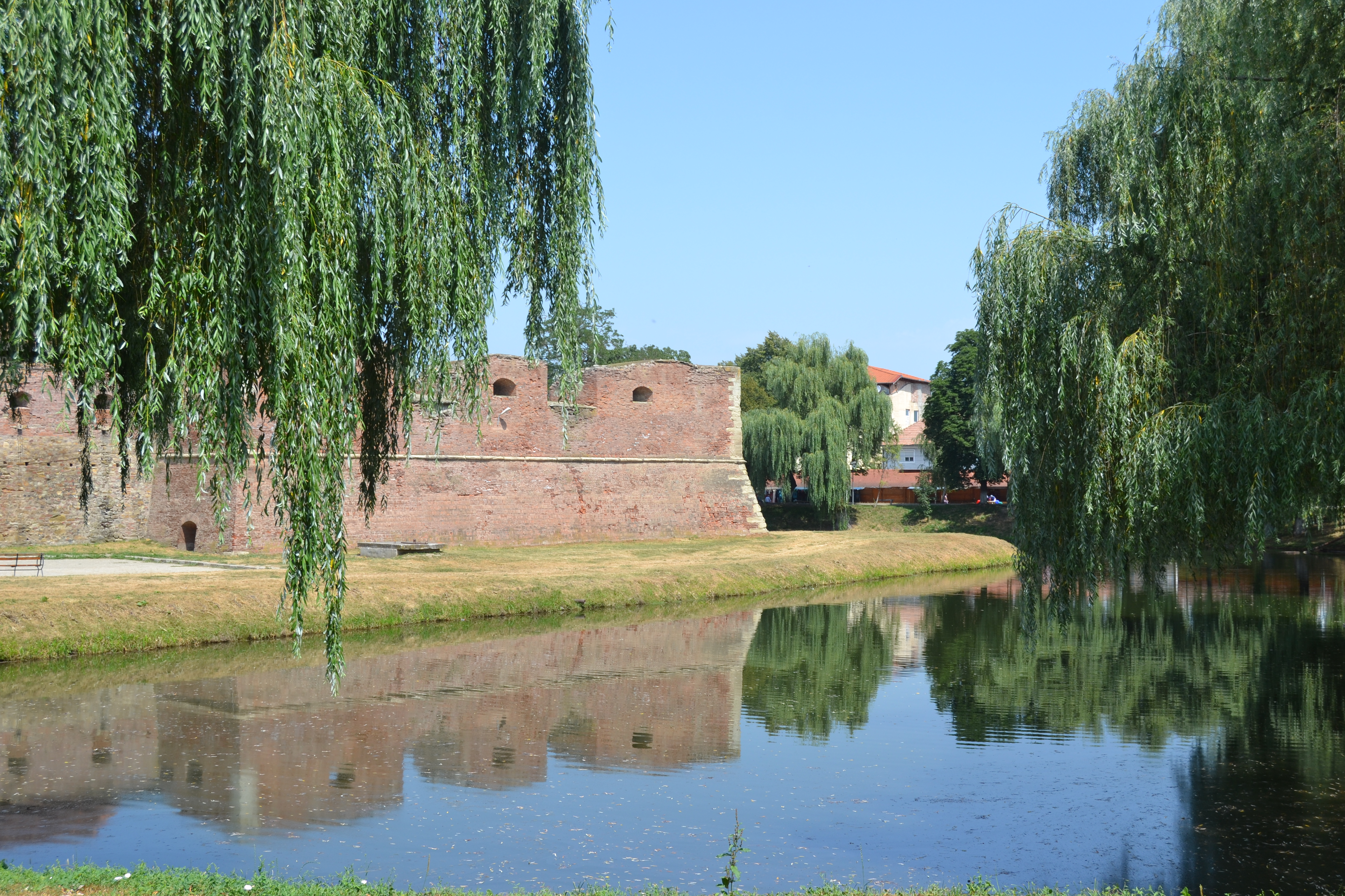 Șanț cu apă 03